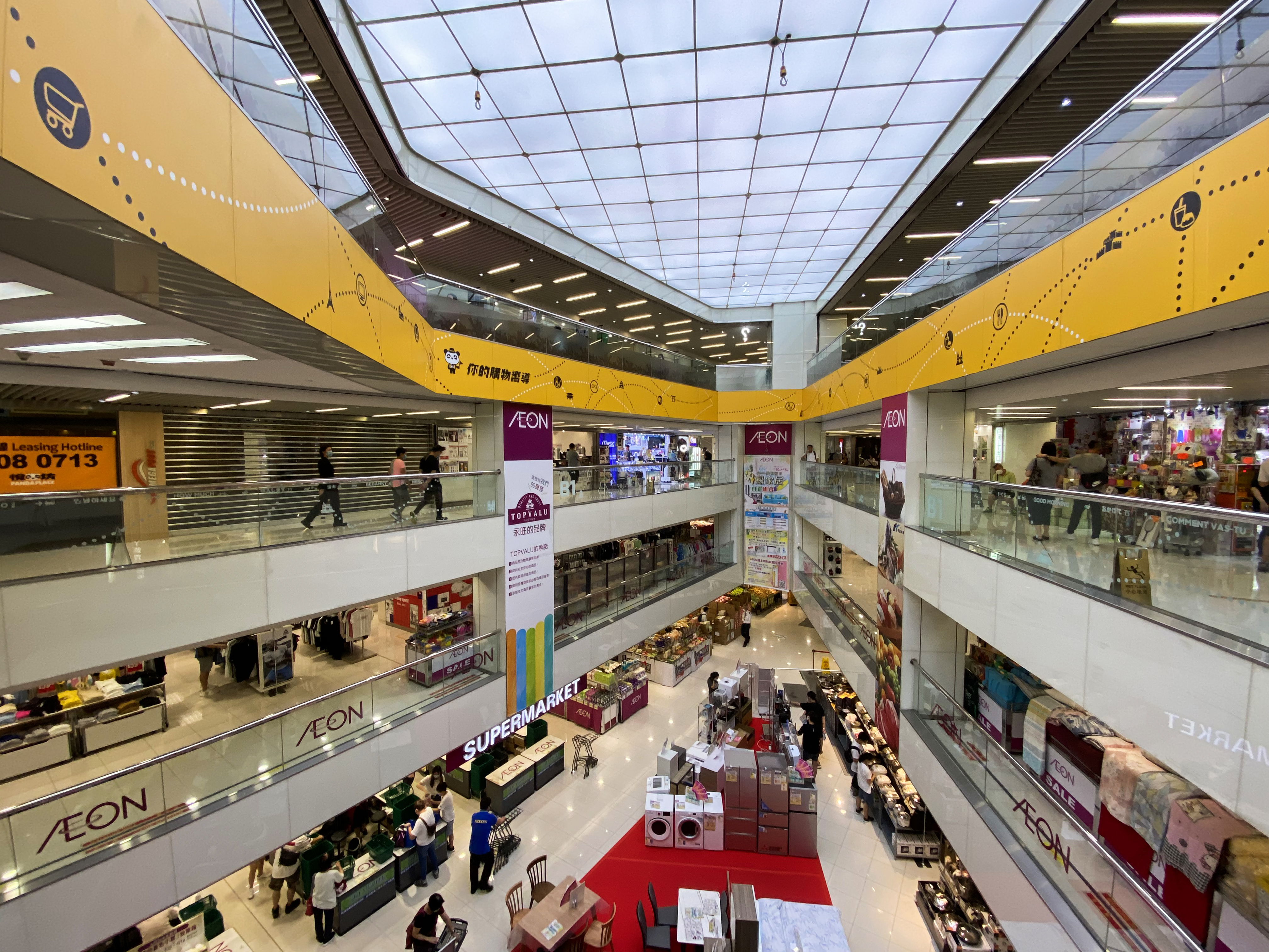 Panda Place Atrium